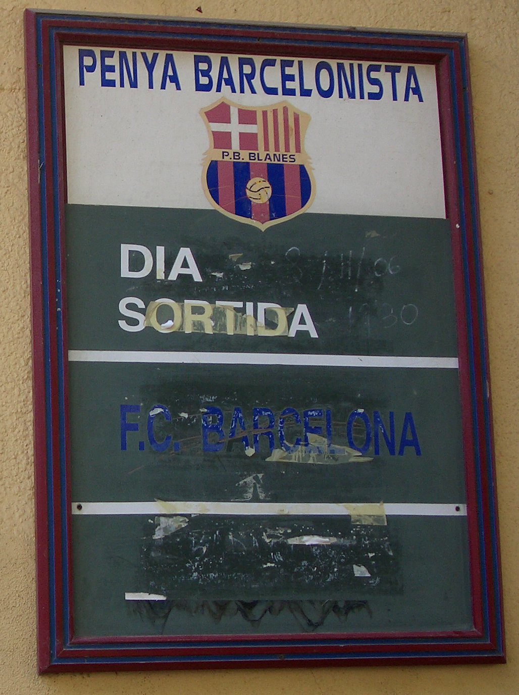 Penya Barcelonista de Blanes (La Selva, Catalunya)